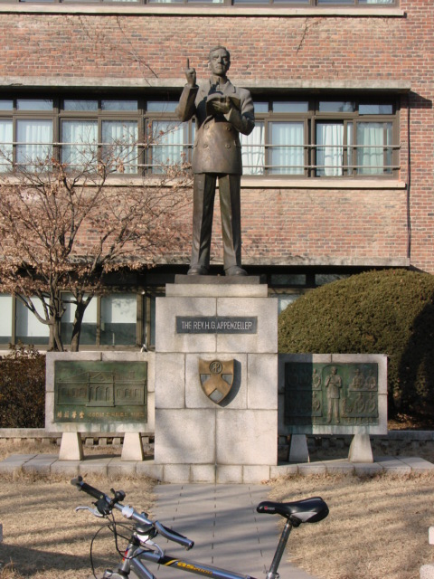 배재학당의 설립자인 H.G.아펜젤러를 기념하기 위해 배재고등학교 캠퍼스 내에 제막된 동상